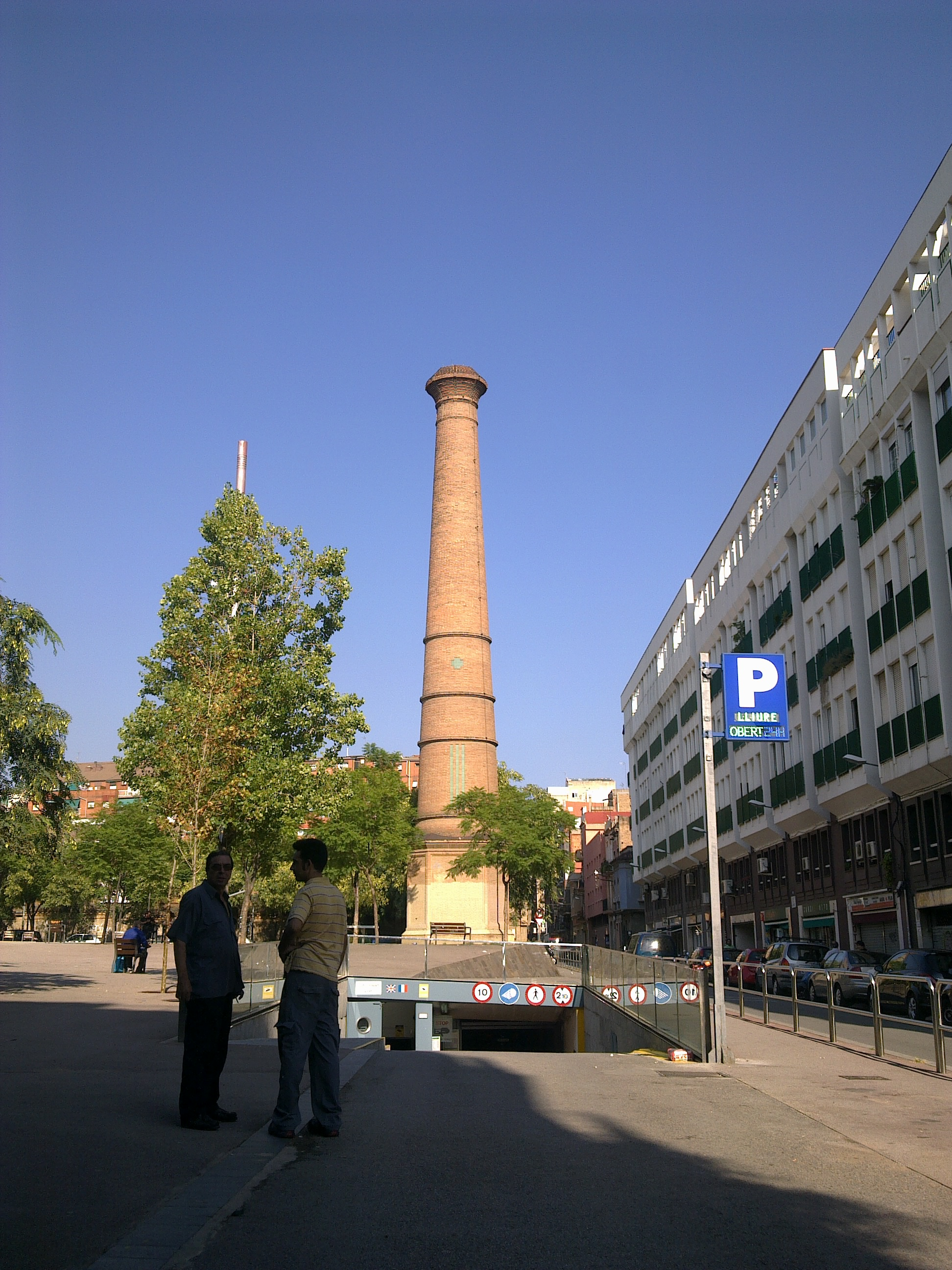 Xemeneia que havia format part d'un conjunt fabril situat al costat de l'antiga fàbrica -Arañó, Ventajó y C.ª- (després propietat de Manufactures Serra i Balet, avui club esportiu). El conjunt fabril ha desaparegut per donar pas a una plaça de nova creació amb aparcament subterrani.